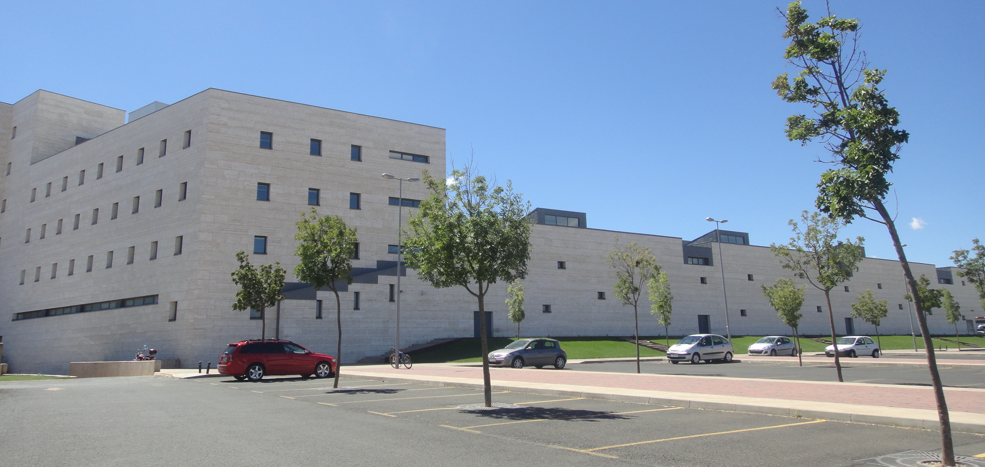 Hospital General Universitario de Ciudad Real, acceso a las consultas externas. Inaugurado en 2005, en Ciudad Real - España.